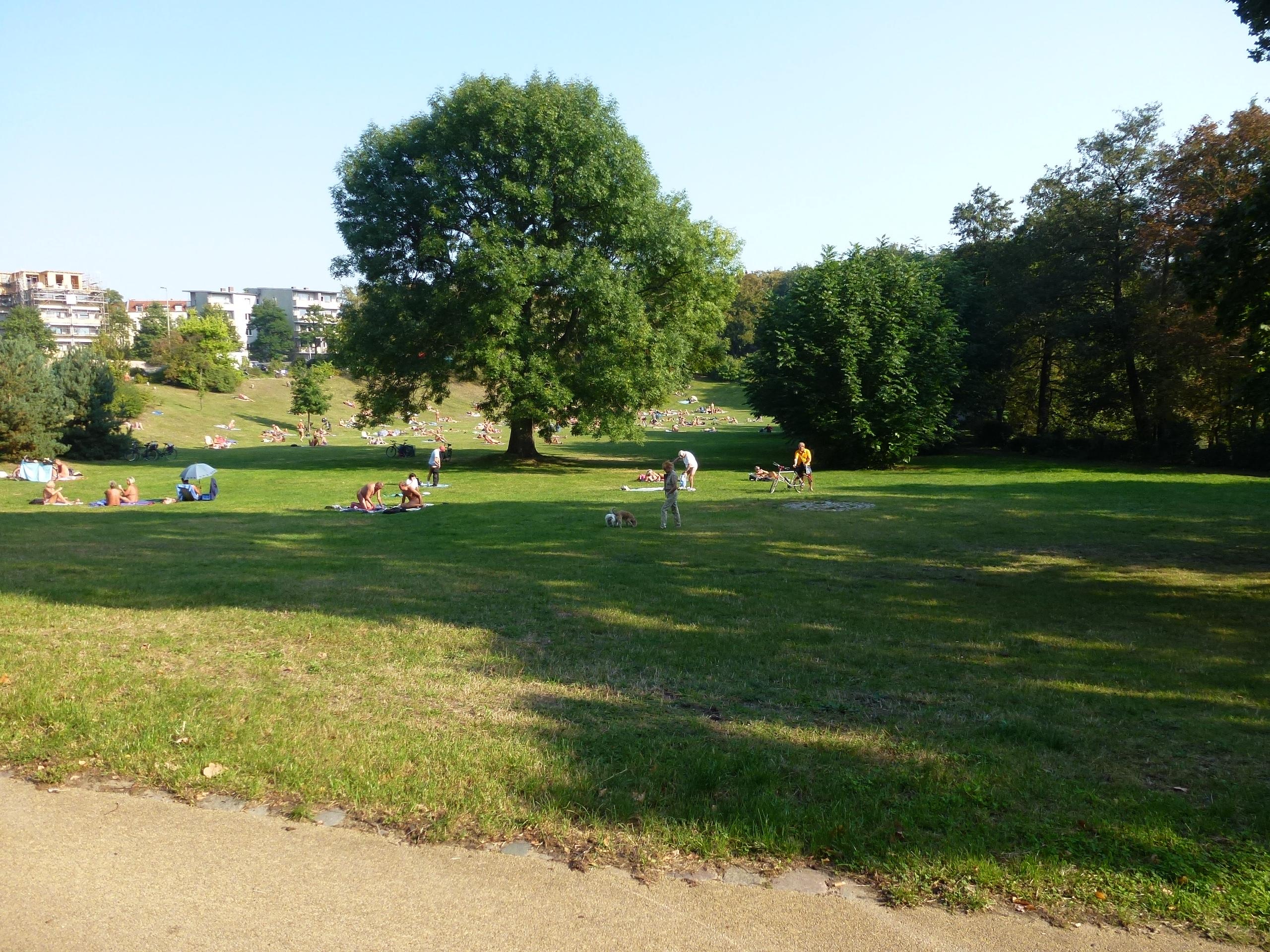 Berlin-Grunewald Friedenthal-Park